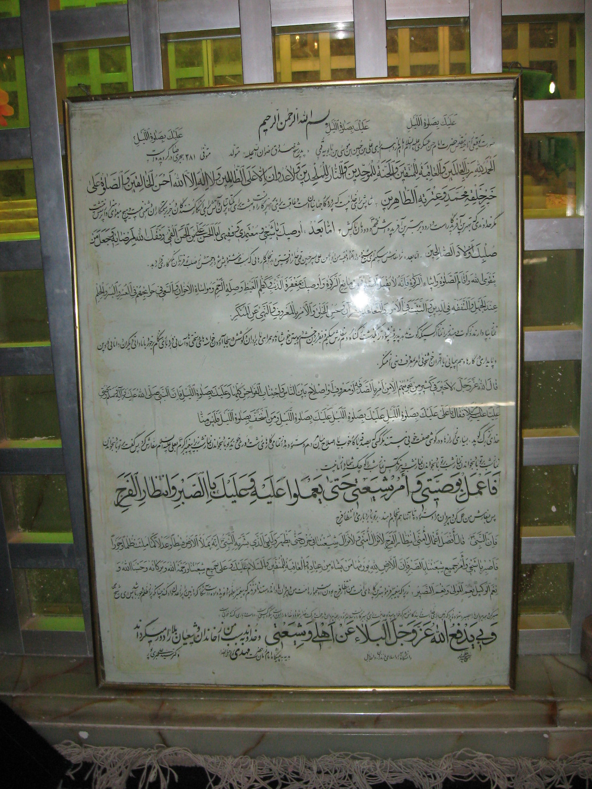 توقیع امام زمان به علی بن بابویه